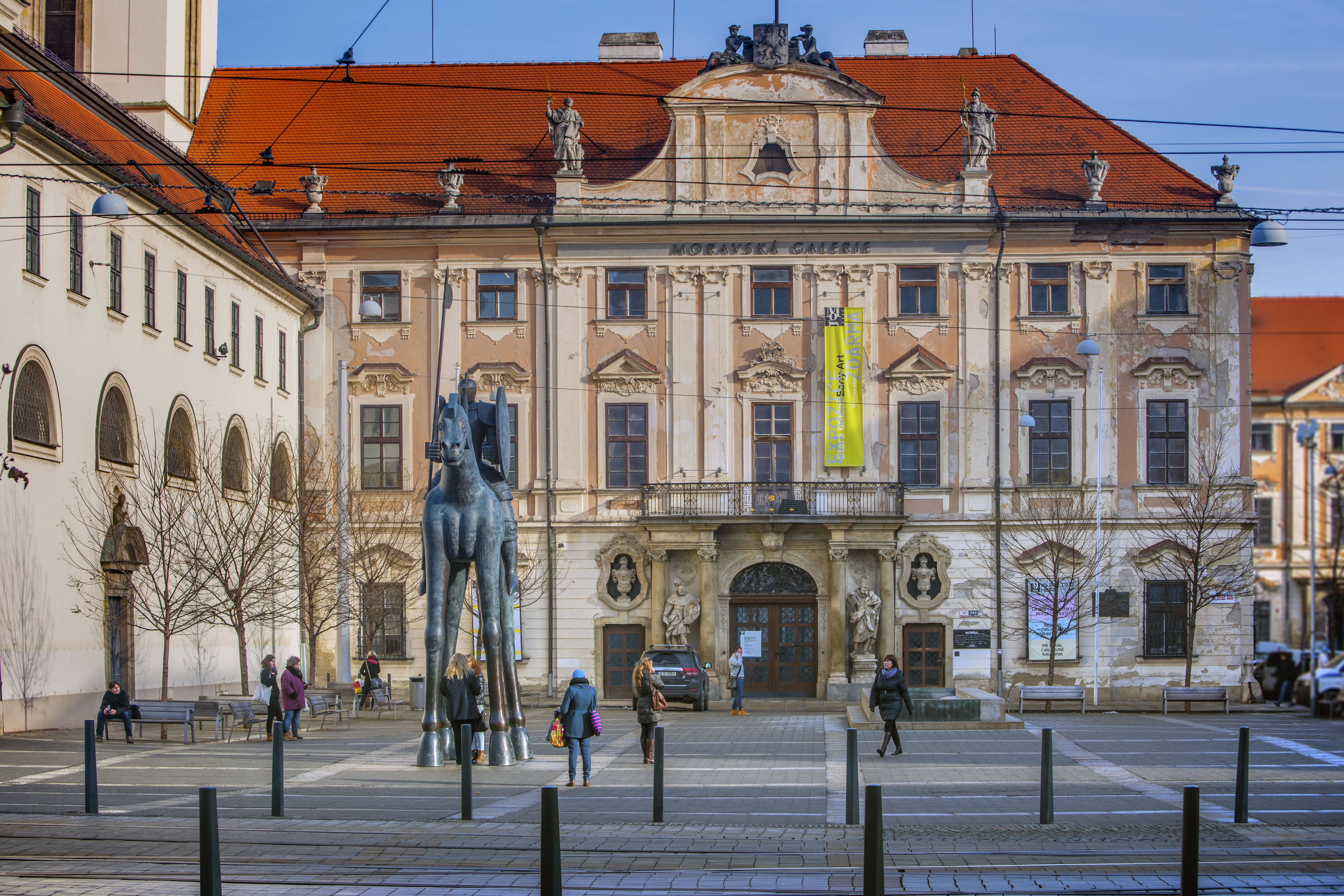 Místodržitelský palác Moravské galerie v Brně (Moravské náměstí 1a)